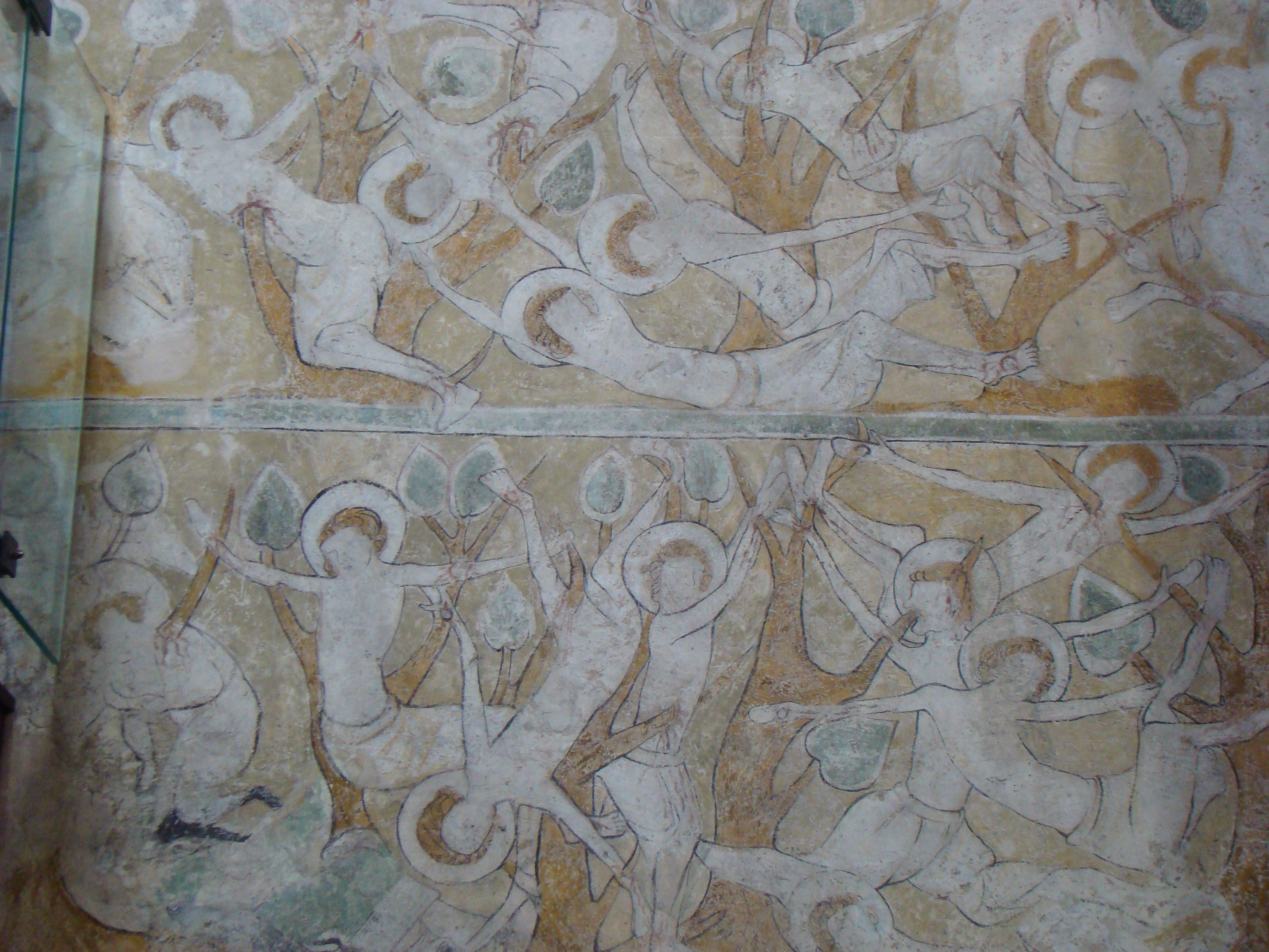 Klosterkirche Lobenfeld